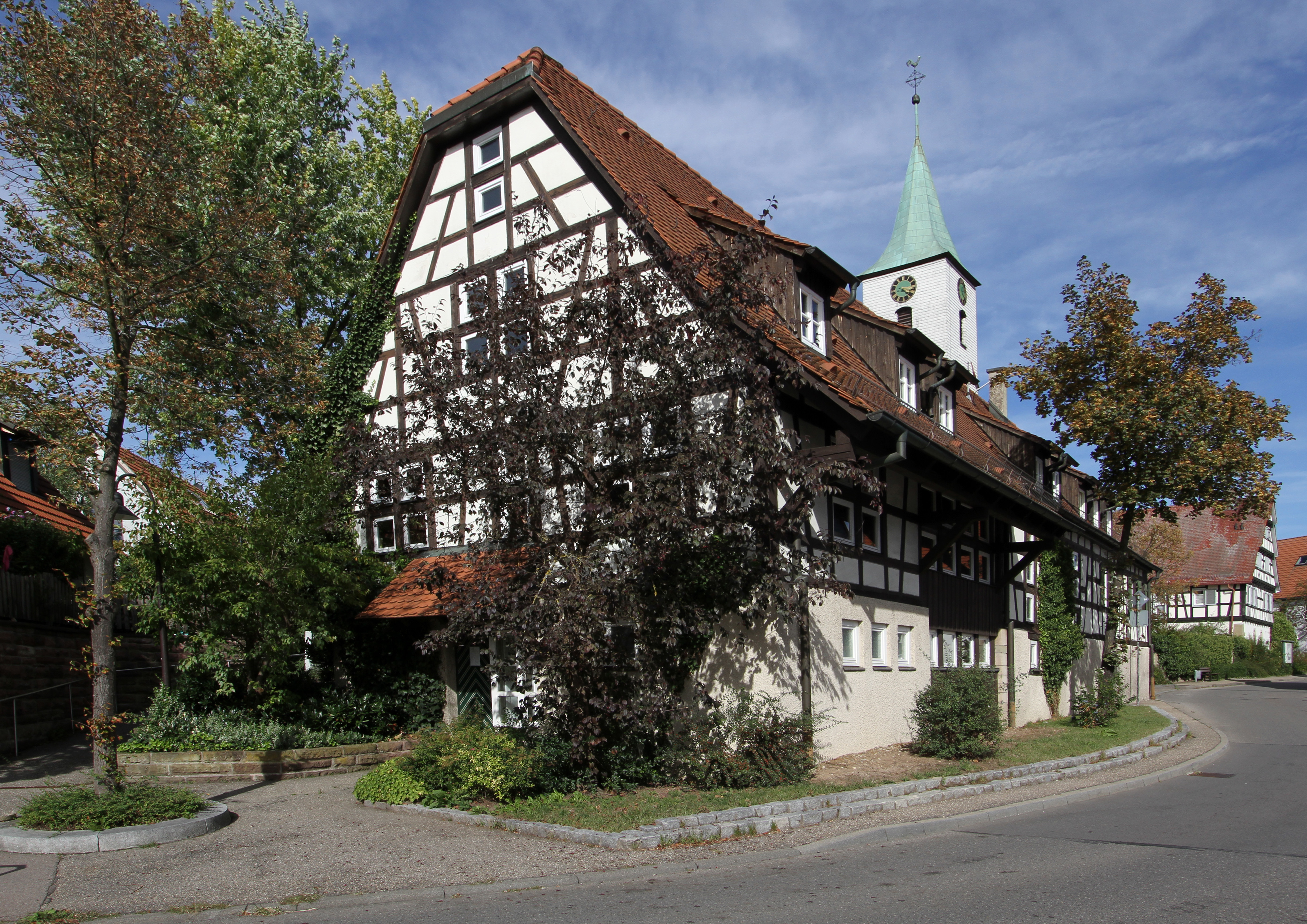 Dieses Fachwerkhaus beeindruckt durch sein restauriertes, teilweise erneuertes Fachwerk. Der Vorgängerbau war ein einstöckiges Wohnhaus, das im Jahr 1797 durch Hans Jerg Haugstetter abgetragen und durch das bis heute bestehende, zweistöckige Einhaus ersetzt wurde. Ein Einhaus ist ein Wohnhaus mit einer Scheune unter einem gemeinsamen Dach. Ab 1877 lässt sich ein Gastbetrieb belegen, der bis 1942 als Gasthaus Krone fortgeführt wurde. 1979 erwarb die Stadt Leonberg dieses Haus und sanierte es. Das Wohnhaus blieb erhalten und in die ehemalige Scheune zog 1981 die Bücherei ein, wie es bei den Eingemeindungsverhandlungen von 1975 vereinbart wurde. Das Foto zeigt die West- und Südseite des Fachwerkhauses.